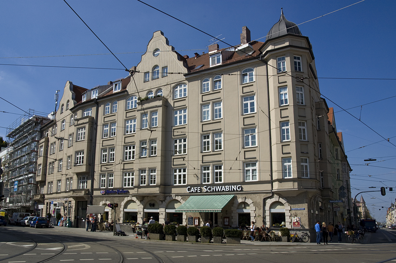 Belgradstraße 1, Mietshaus, fünfgeschossiger Eckbau mit Erkern, Zwerchgiebeln und polygonalem Eckerker mit Glockendach, errichtet in den Formen der deutschen Renaissance, 1898 von Xaver Heininger; bildet mit Hohenzollernstraße 86 einen monumentalen Block, der den Kurfürstenplatz nördlich abschließt.